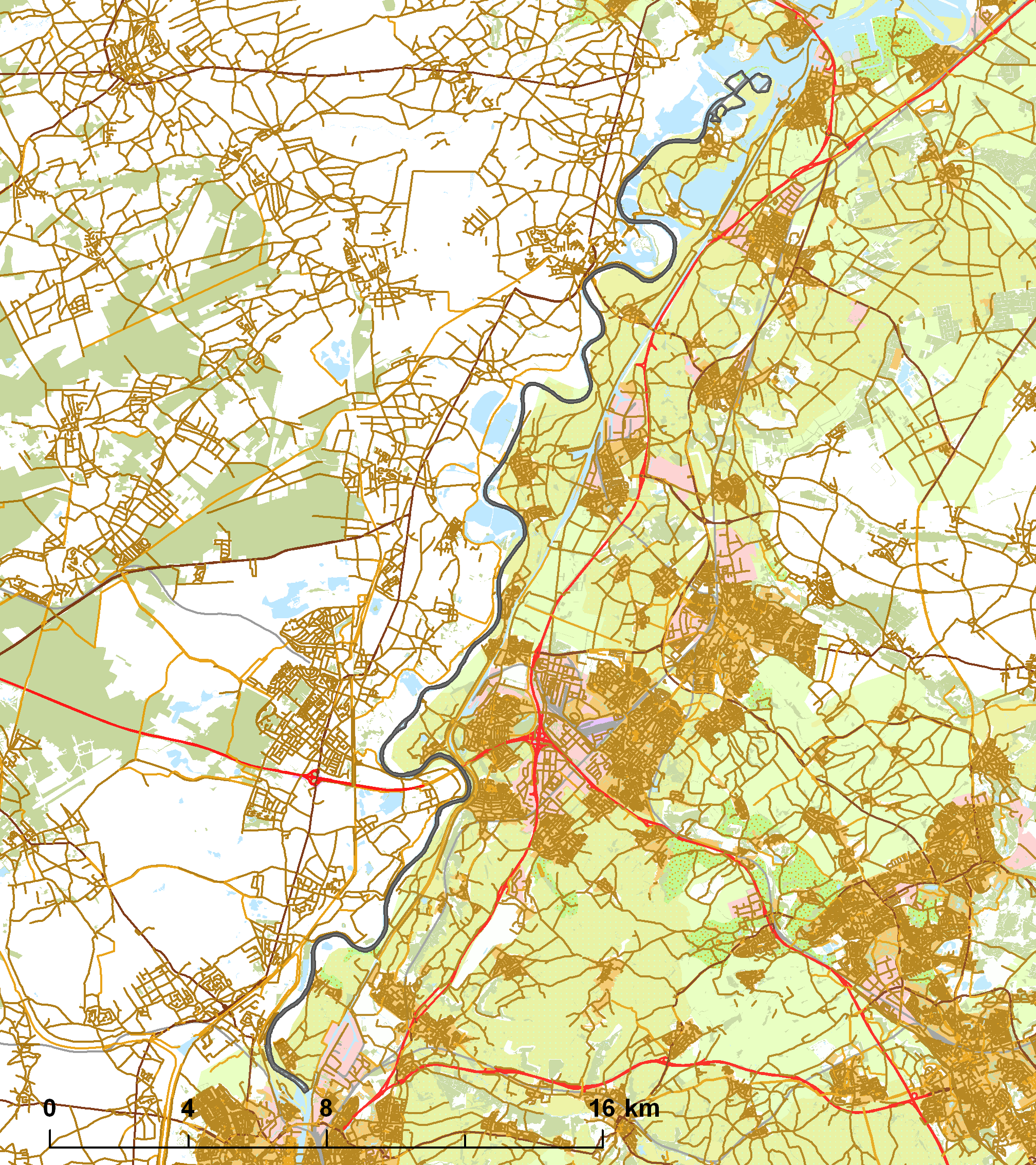 Natura2000 - Grensmaas.png